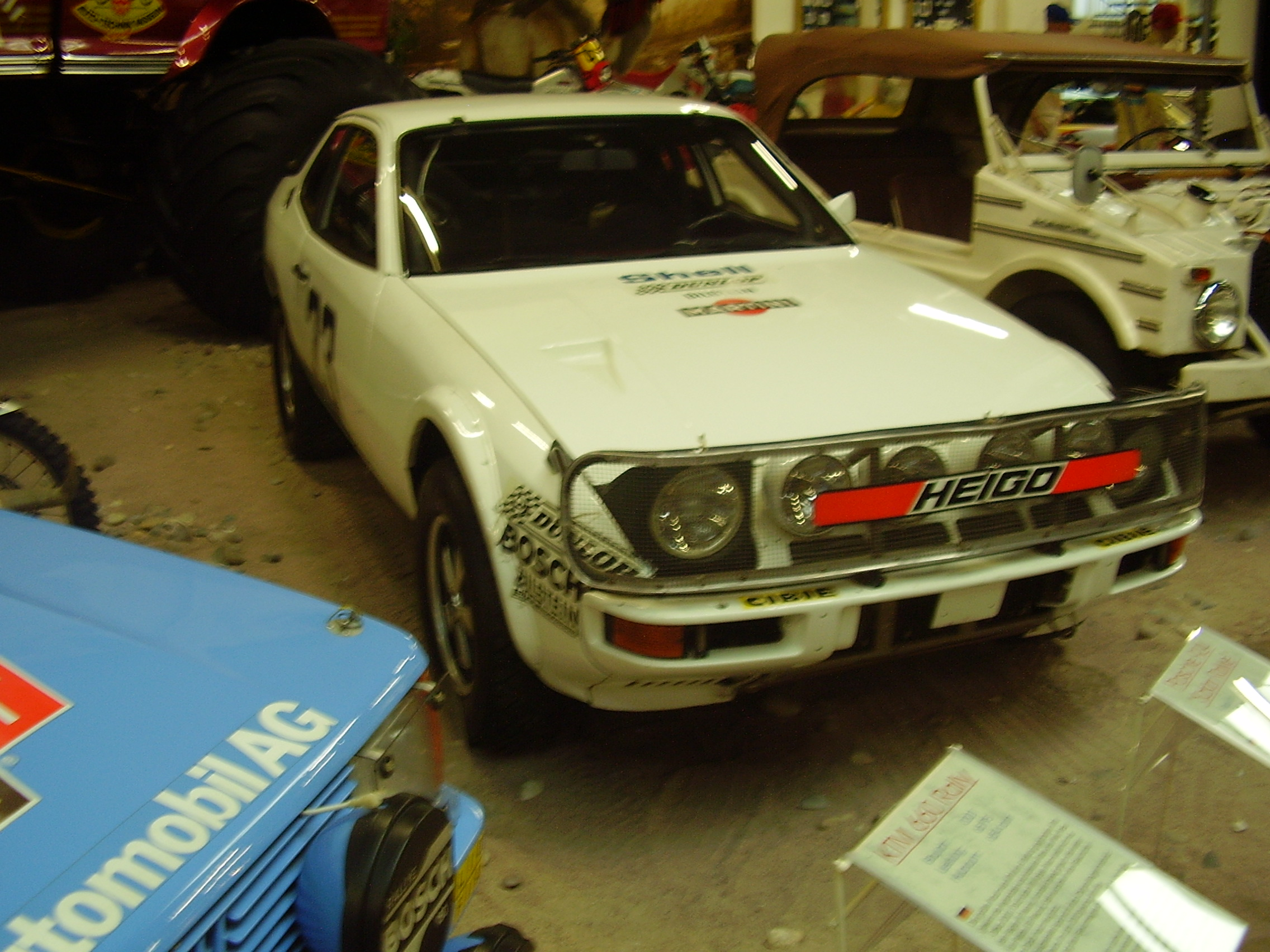 1979 Porsche 924 Rally-Turbo at the Sinsheim Auto & Technik Museum (Sinsheim / Germany)